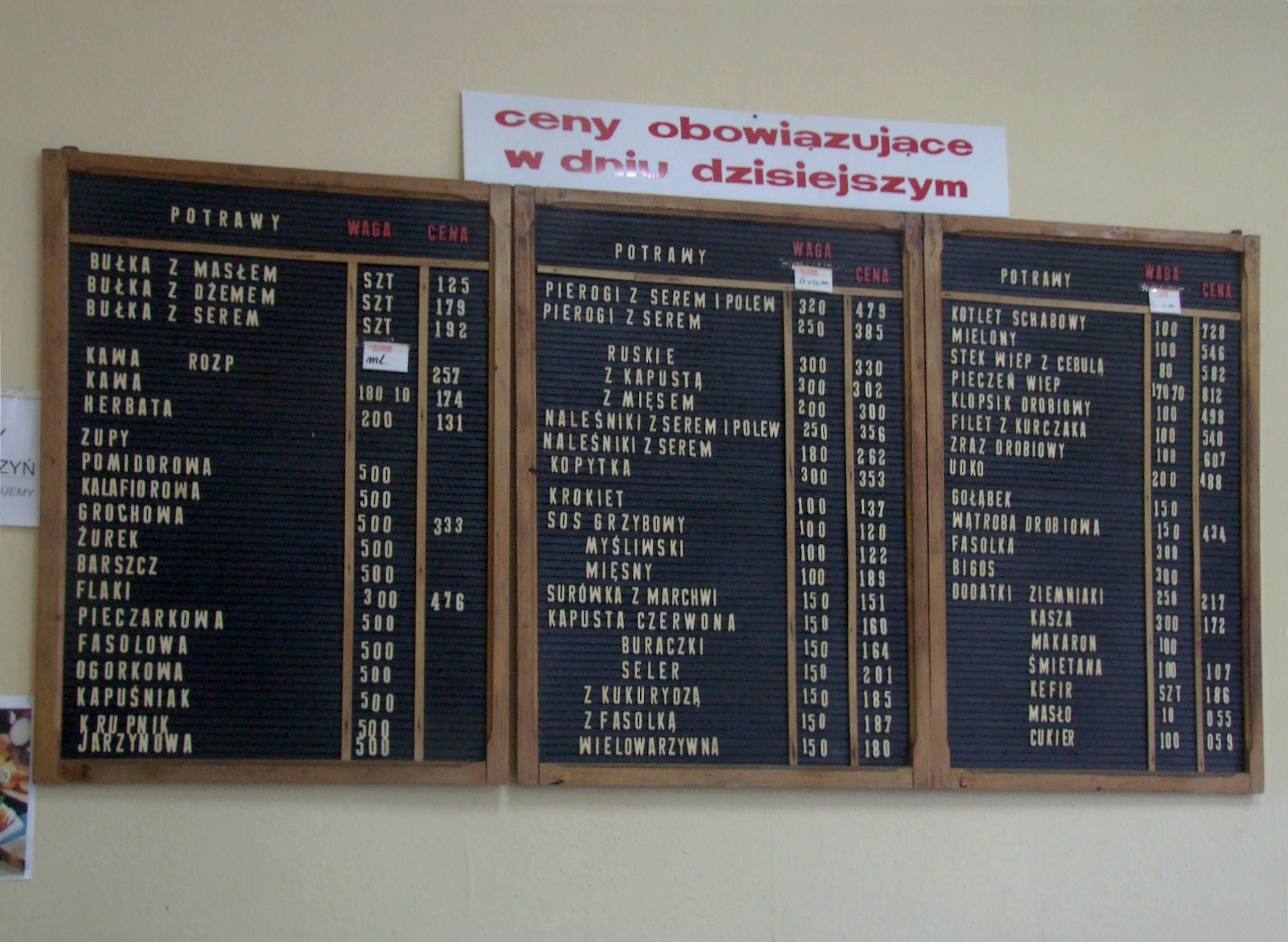 menu baru Społem (Bar "Piast", Zielona Góra ul. Wojska Polskiego)